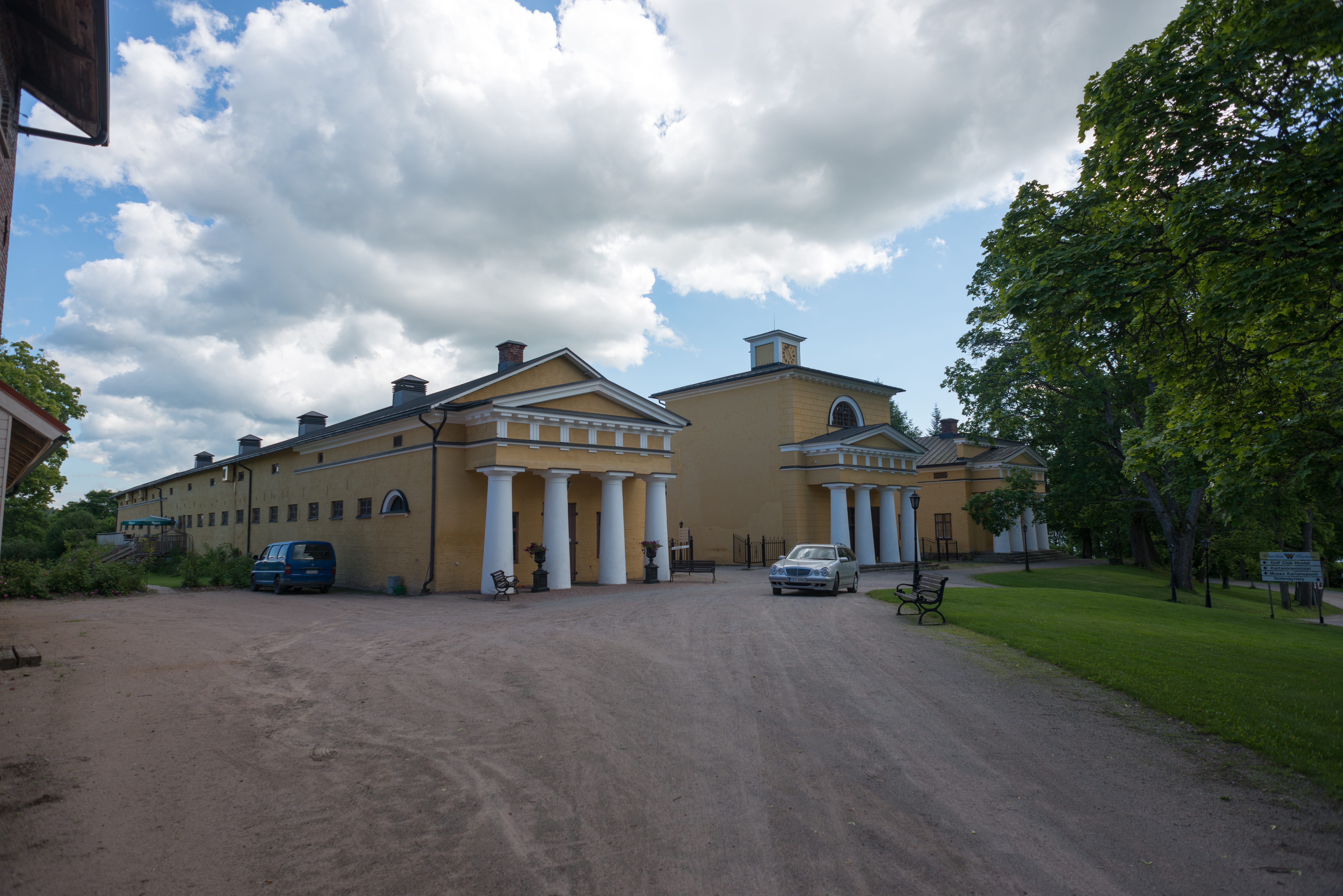 Wiurilan kartano